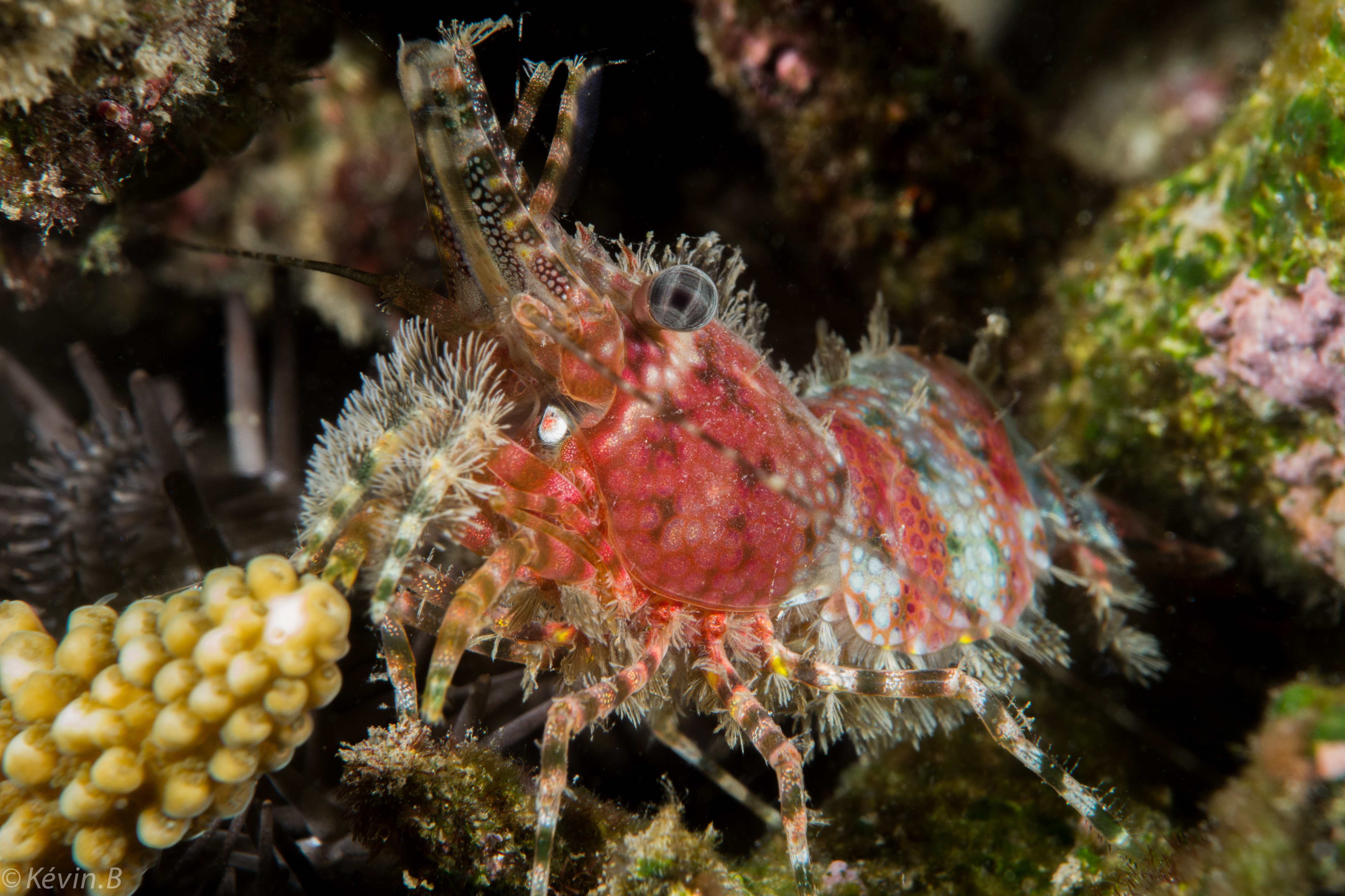 Une crevette marbrée (Saron marmoratus) dans le lagon de Saint-Paul à la Réunion.